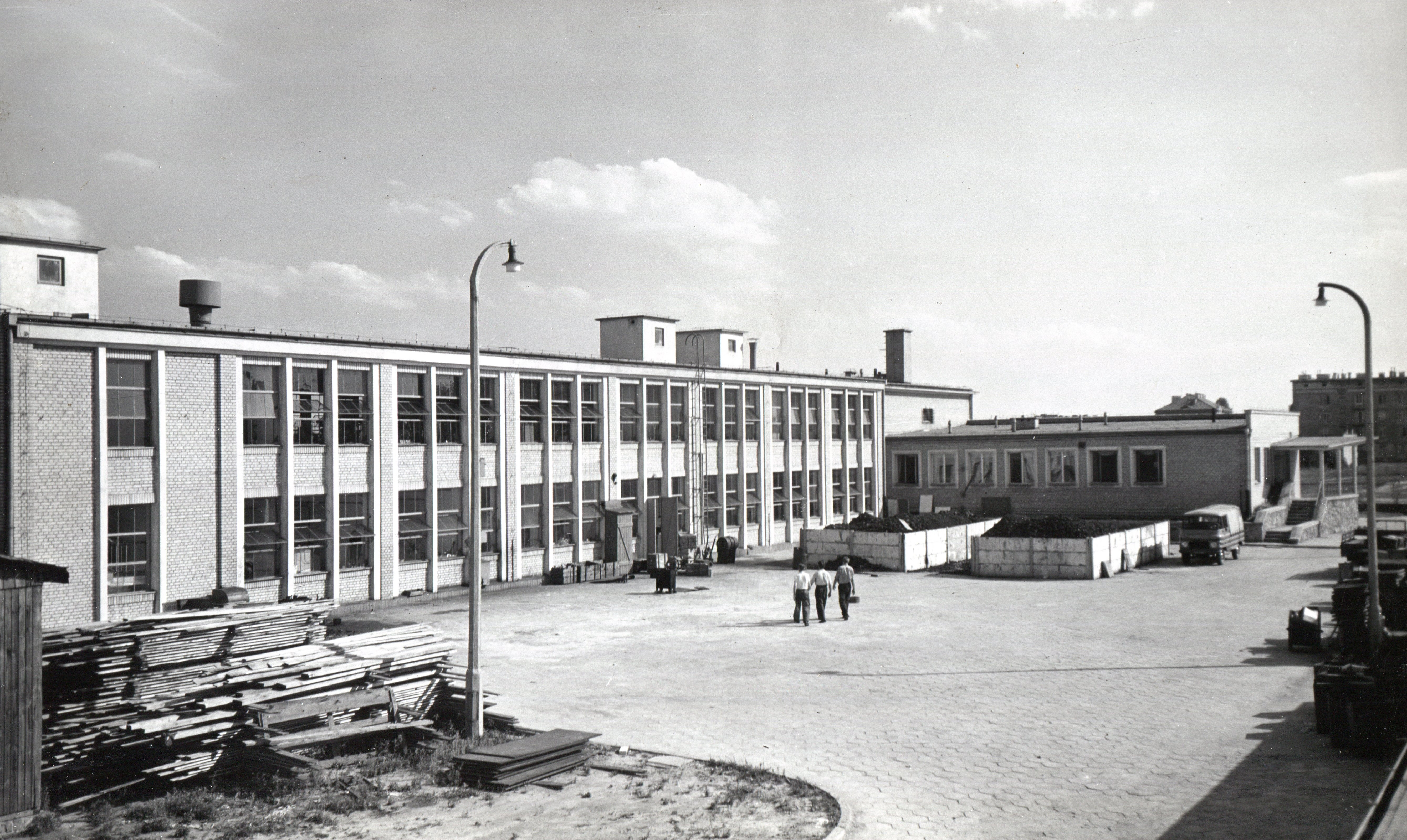 Budowa zakładu produkcyjnego przy Boremlowskiej 46 w Warszawie.